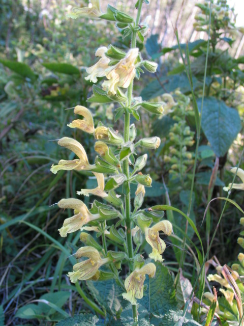 Salvia glutinosa